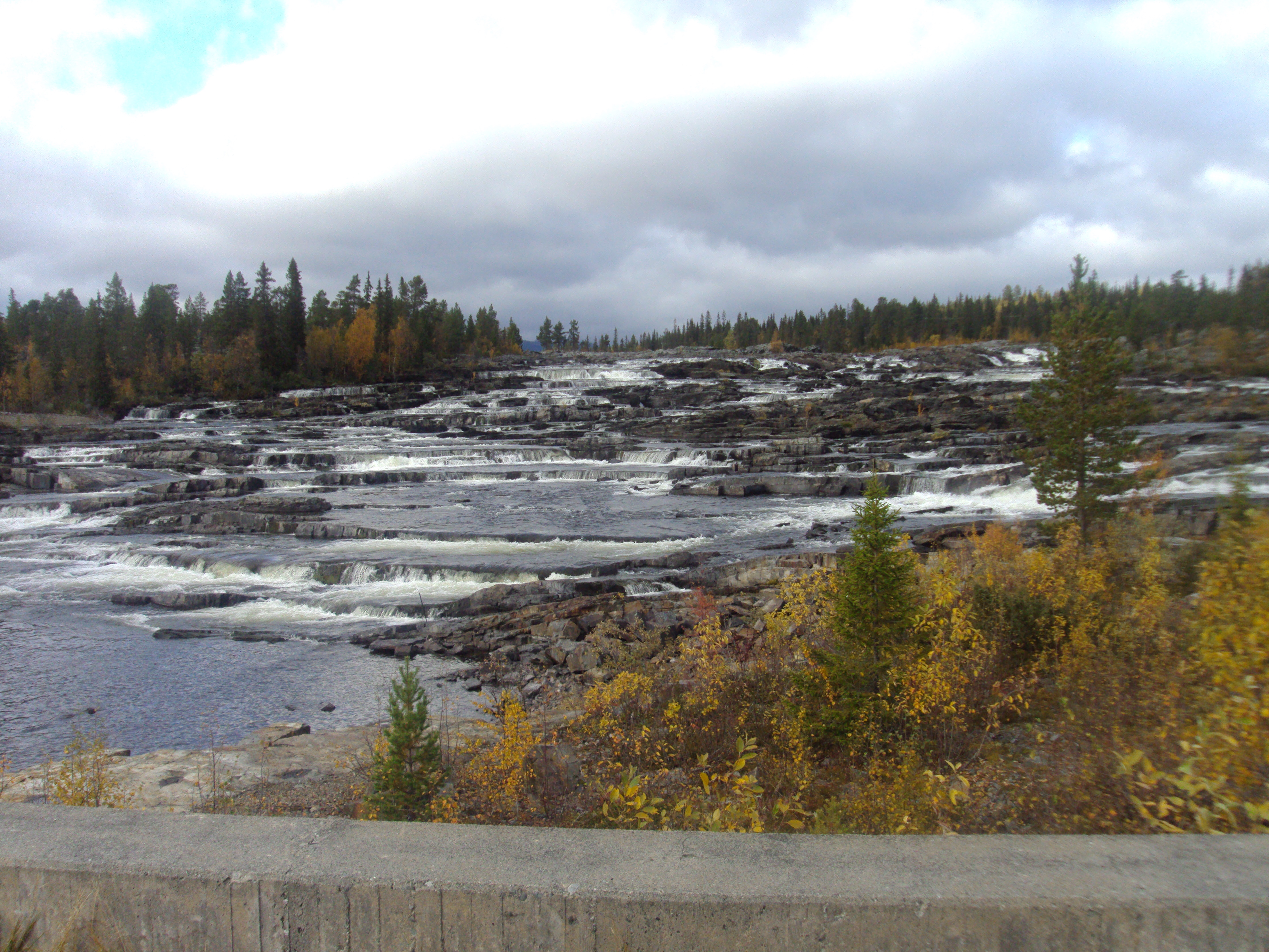 Trappstegsforsen, Vilhelmina kommun